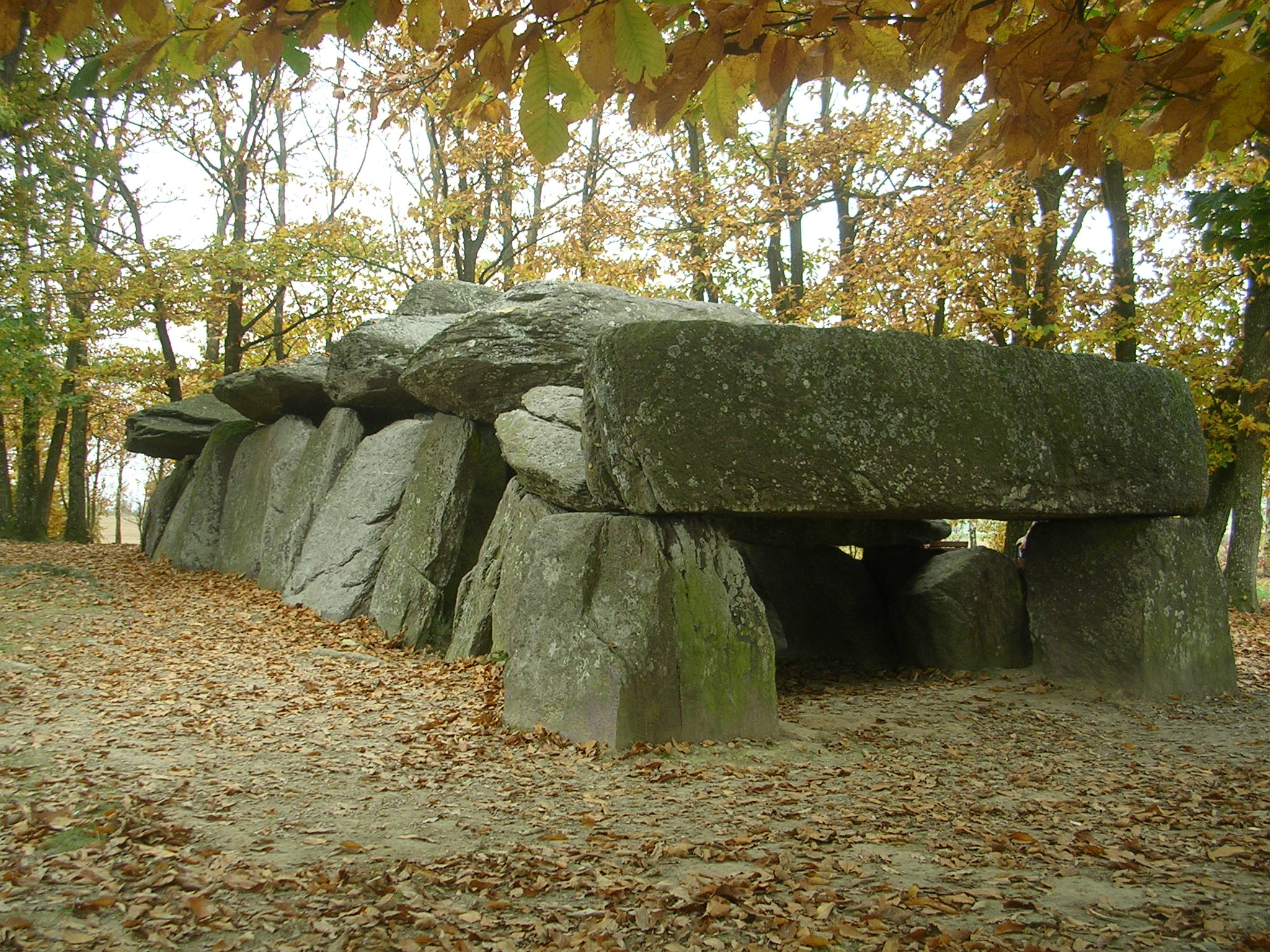 Dolmen de la Roche-aux-Fées à Essé en Ille-et-Vilaine .